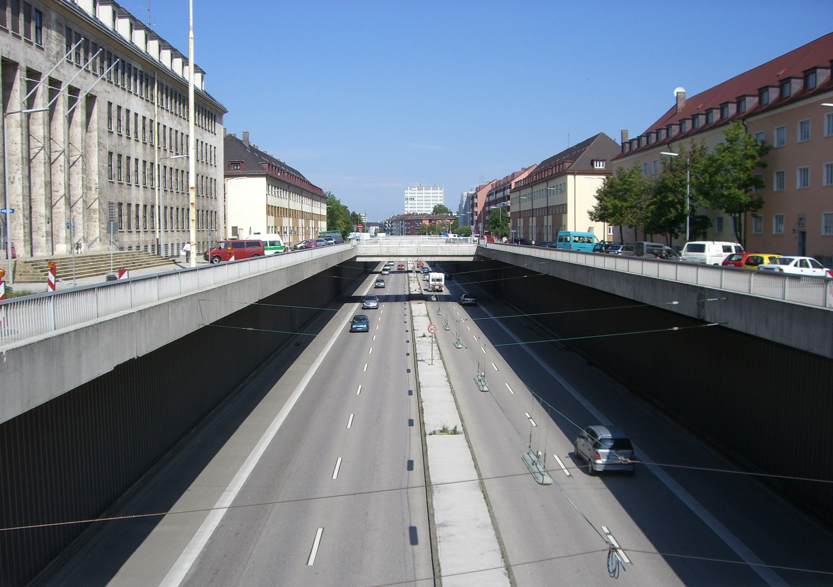 McGraw-Graben in München-Obergiesing